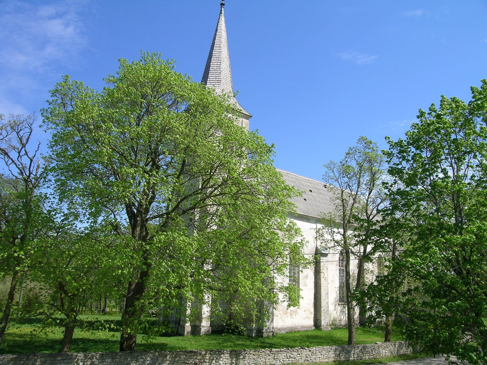 Mustjala kirik aasta enne tornikiivri punaseks värvimist